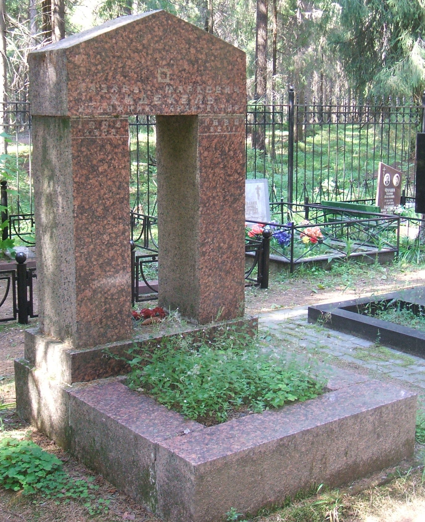 Комаровское кладбище Деятели культуры и науки